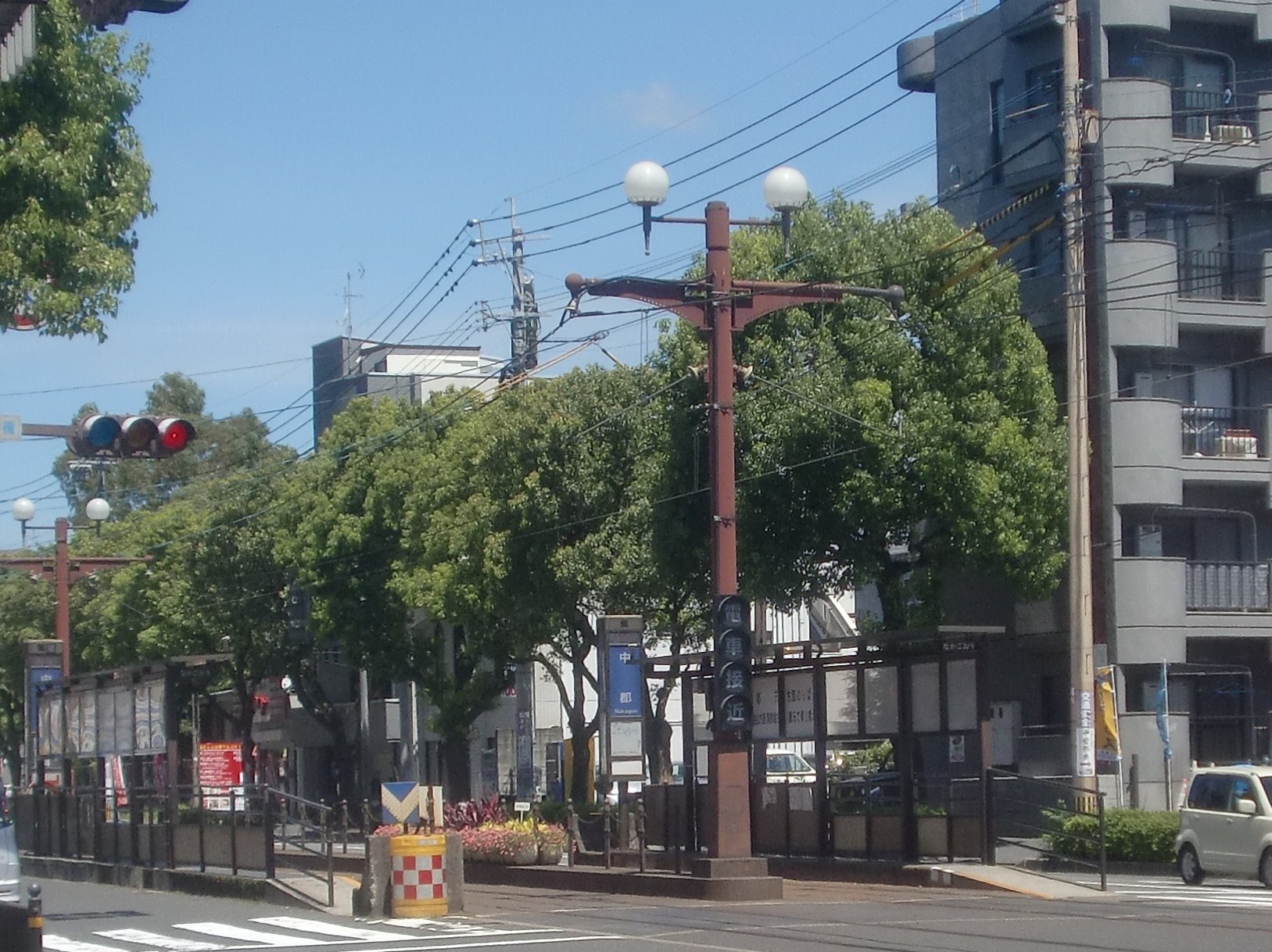 中郡駅_(鹿児島県)の外観。